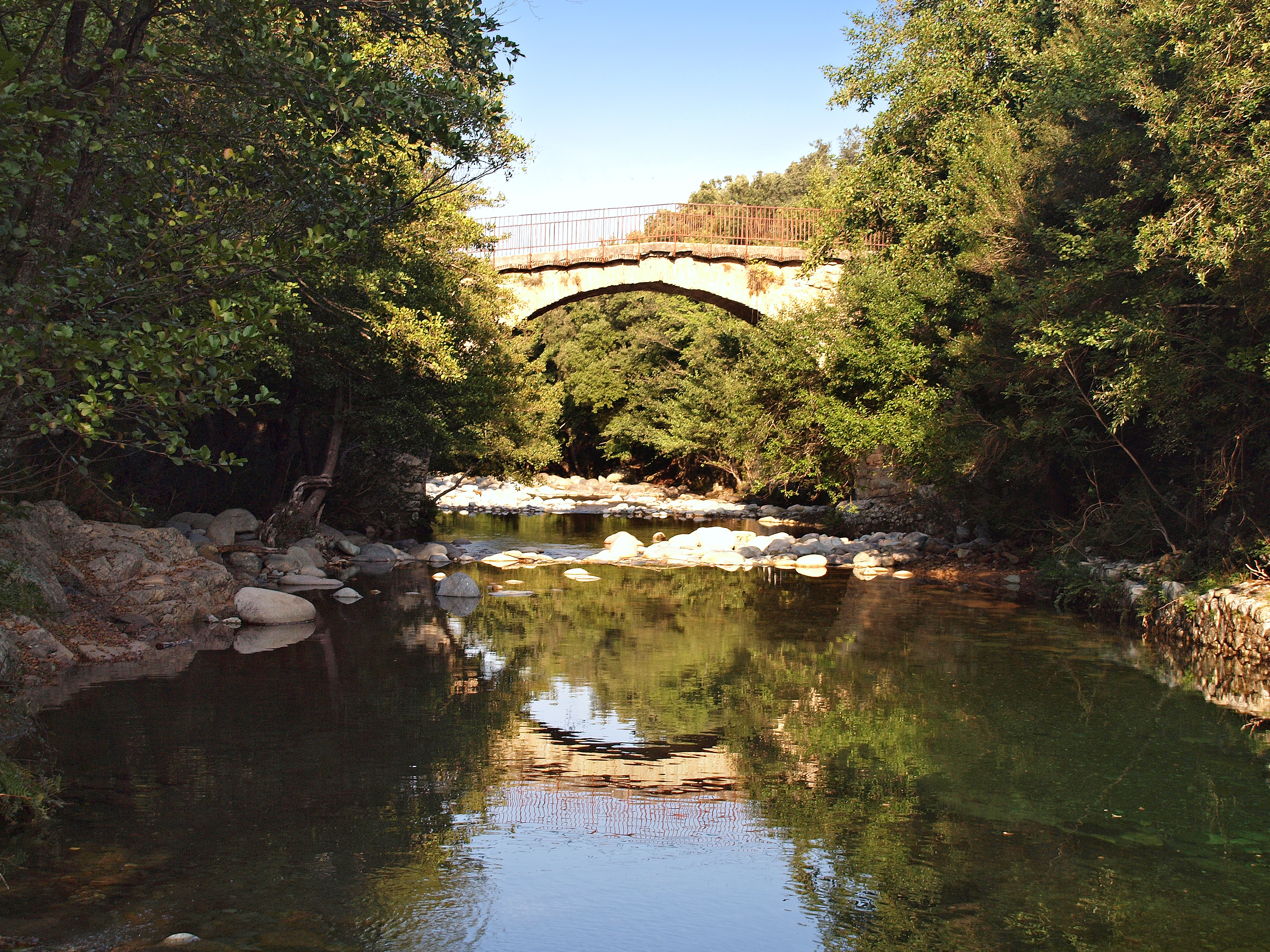 Moltifao - Ponte Vecchiu, "Vieux-pont" génois sur la D147